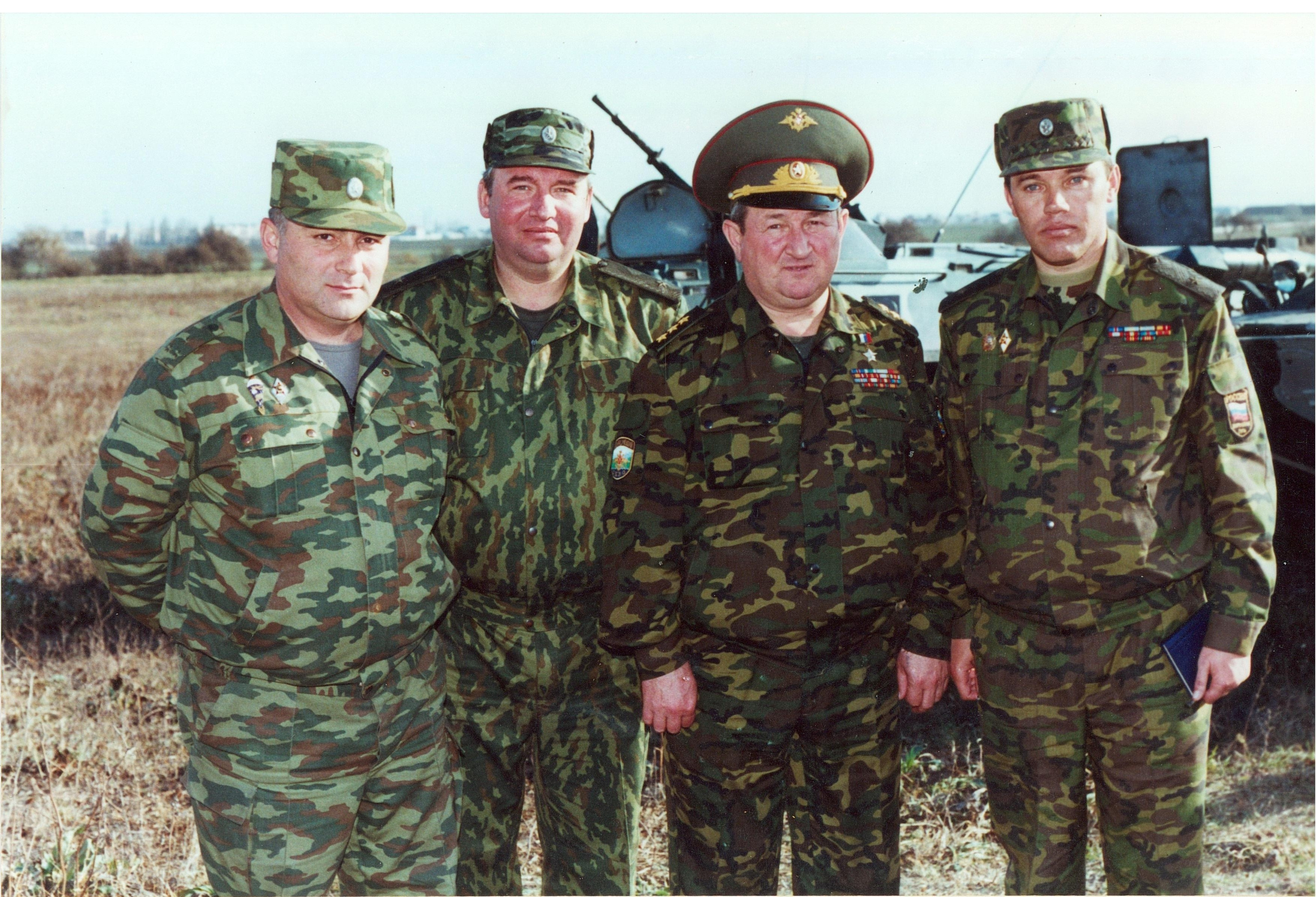 герой России генерал-полковник Трошев Г.Н. и командование 58 армии. Учения , Баксан, октябрь 2001